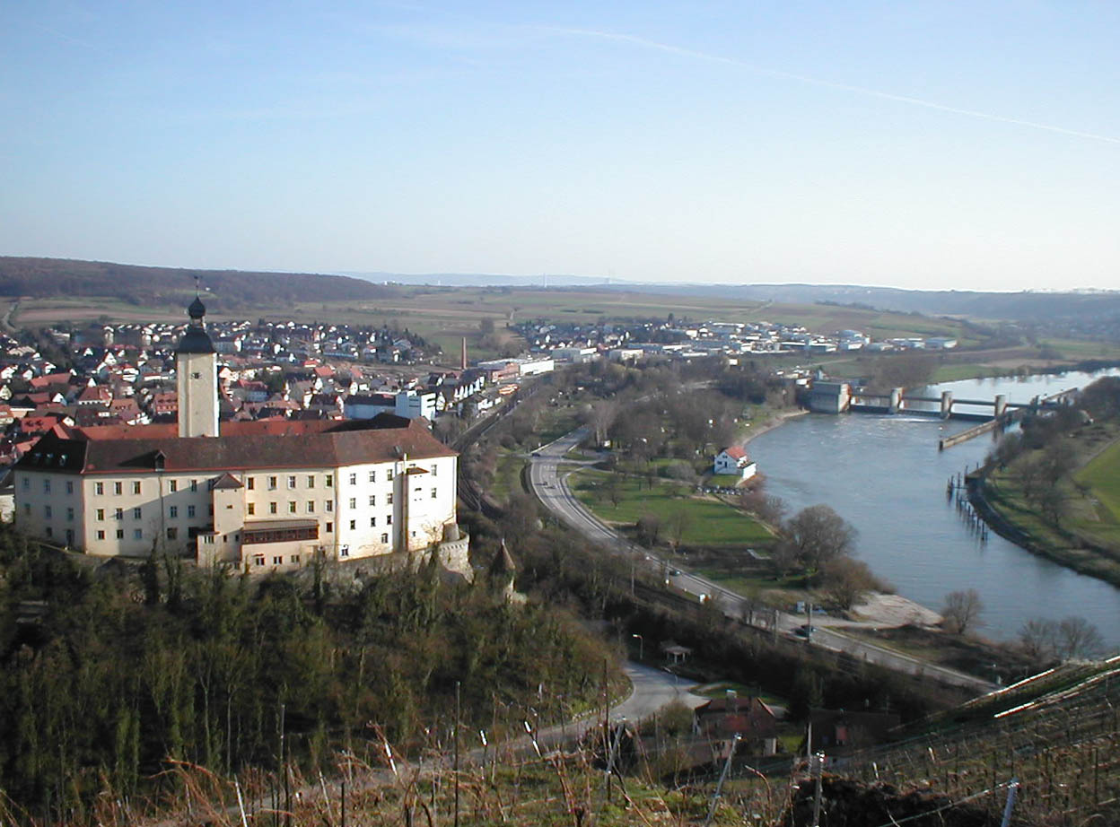 Blick vom Michaelsberg über Gundelsheim mit Schloss Horneck und das Neckartal